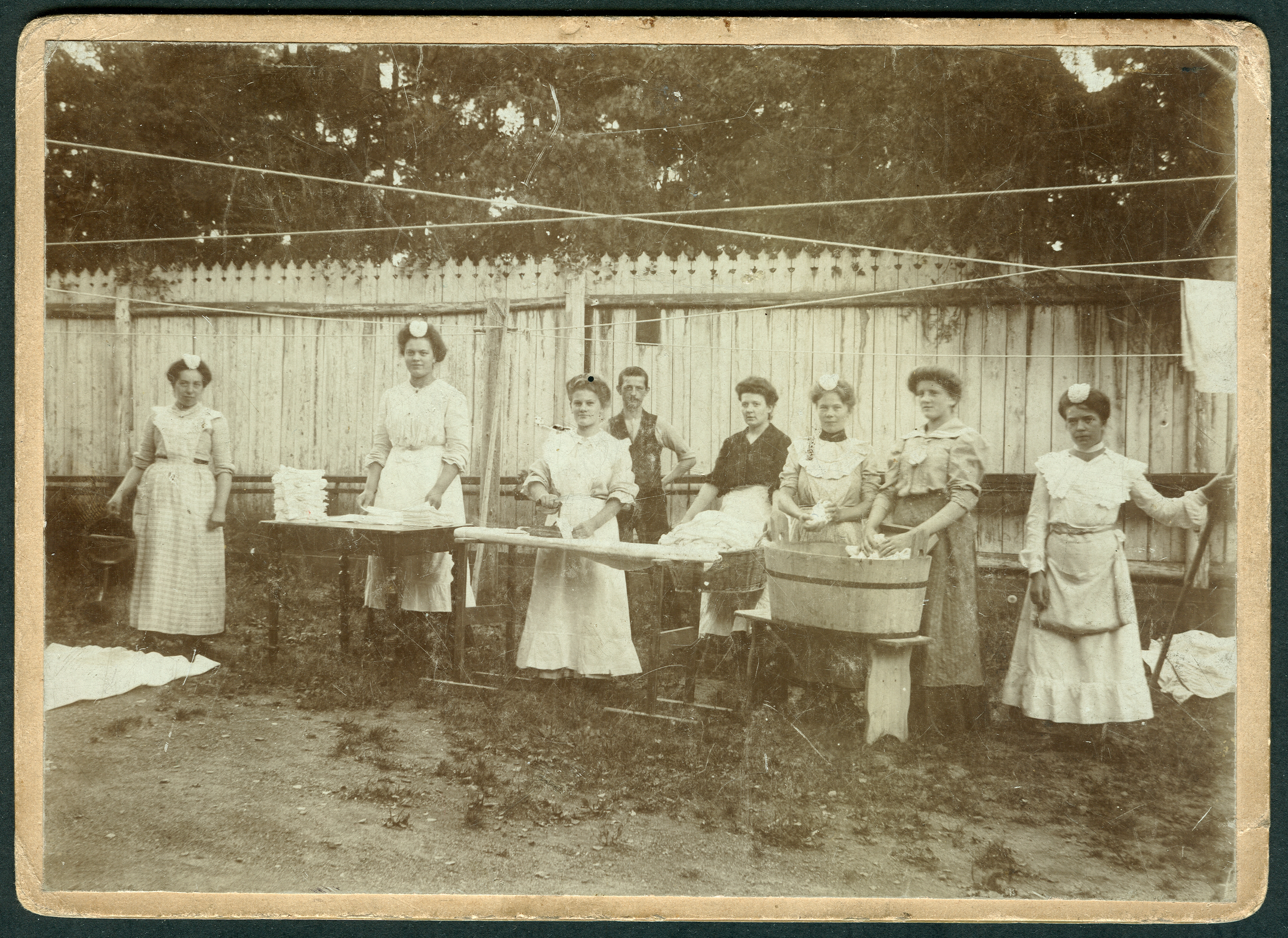 Acht Arbeitsplätze anstelle einer automatisierten Wäscherei, an einem unidentifizierten Ort, vermutlich für einen herrschaftlichen Haushalt in Deutschland, um 1890: Sieben Wäschefrauen und ein Wäscher arbeiten mit Waschzuber, Waschbrett (auch Wäscheruffel genannt), Auswringen per Handarbeit, einer Gießkanne zum Bleichen auf dem Boden mit Sonnenstrahlen ("Zeigt her, Eure Füße, zeigt her, Eure Schuh ..."), einer Frau mit Wäscheklammern im umgehängten Beutel und sowie einem Hausmädchen mit Wechselgriff-Bügeleisen. Das Foto wurde im Kabinettformat entwickelt.